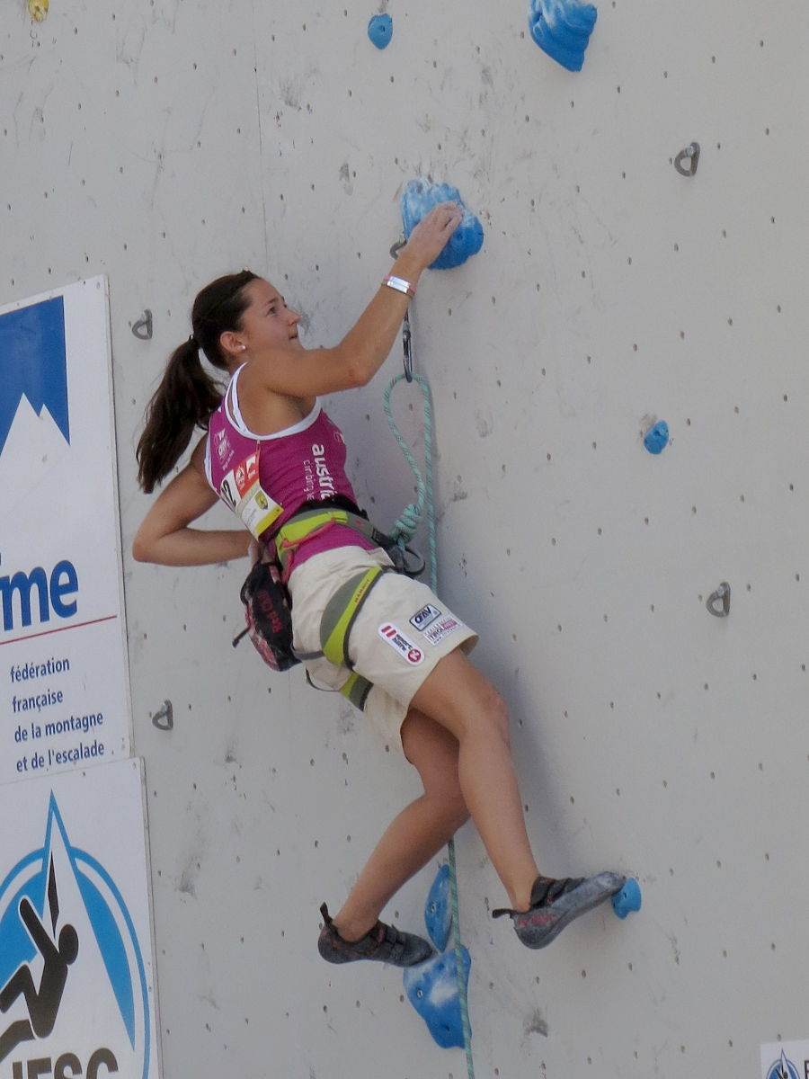 Magdalena Röck en demi-finale du championnat d'Europe d'escalade (difficulté) 2013 à Chamonix